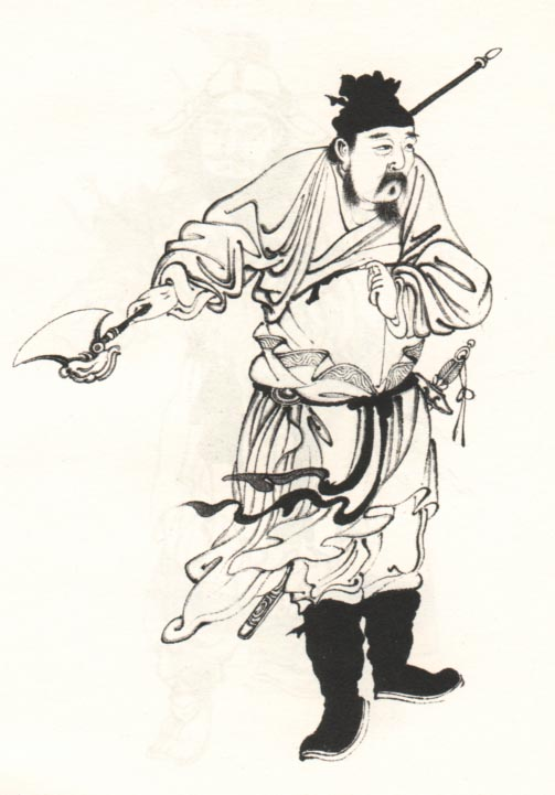 耿再成，明朝军事将领。